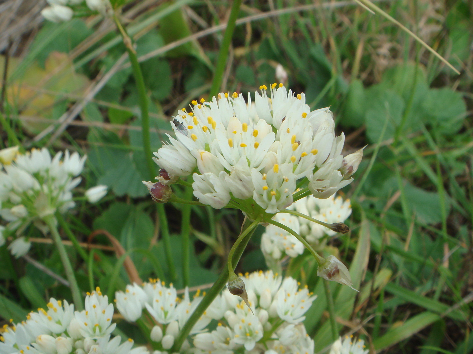 Allium subvillosum, Chiclana (Cádiz) España